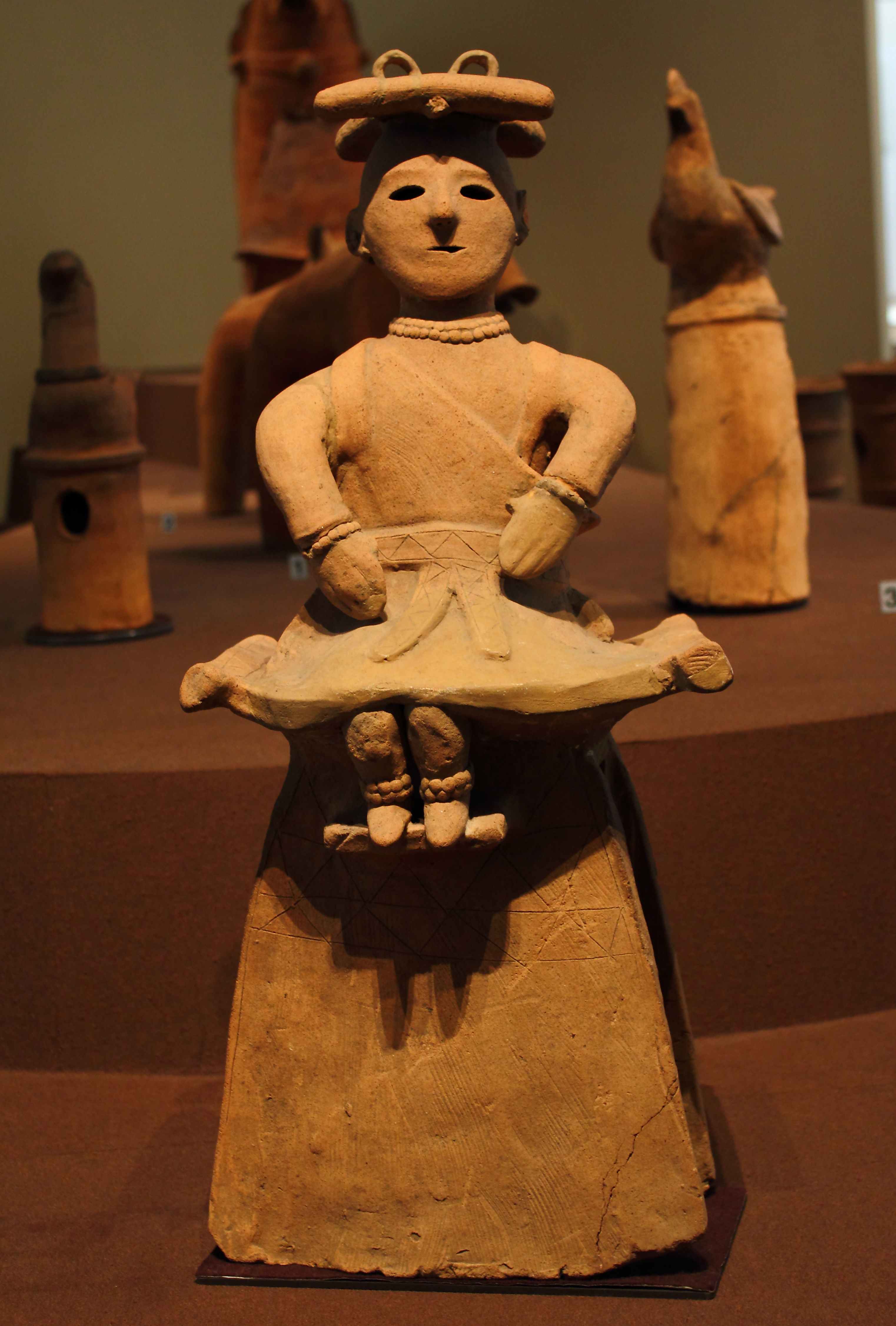 埴輪「腰をかける巫女」（重要文化財）。東京国立博物館。